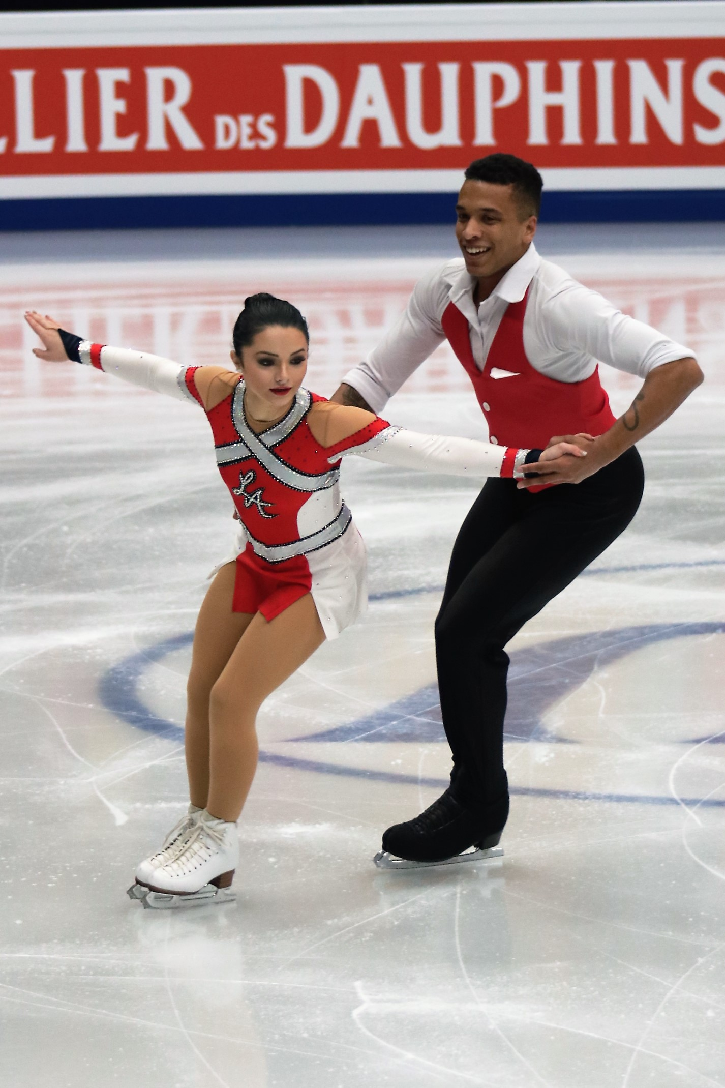 Лана Петранович и Антонио Соуза-Кордейру (Хорватия) на Чемпионате Европы по фигурному катанию 2018